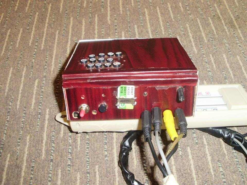 جهازا يتنبأ بالكوارث